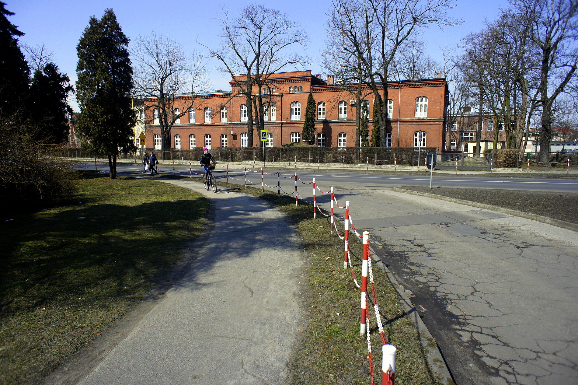 Samodzielny Publiczny Zakład Opieki Zdrowotnej Szpital Powiatowy im. Marcelego Nenckiego w Krotoszynie. W czasie pandemii koronawirusa doszło w nim do tragicznych wydarzeń. W poniedziałek 30 marca 2020 r. ośmiu pacjentów oddziału wewnętrznego nagle zaczęło gorączkować i mieć objawy infekcji. Okazało się, że wszyscy są zakażeni a nieopanowanie rozprzestrzeniania choroby doprowadziło do tego, że wkrótce zaczęto mówić o zamknięciu miasta